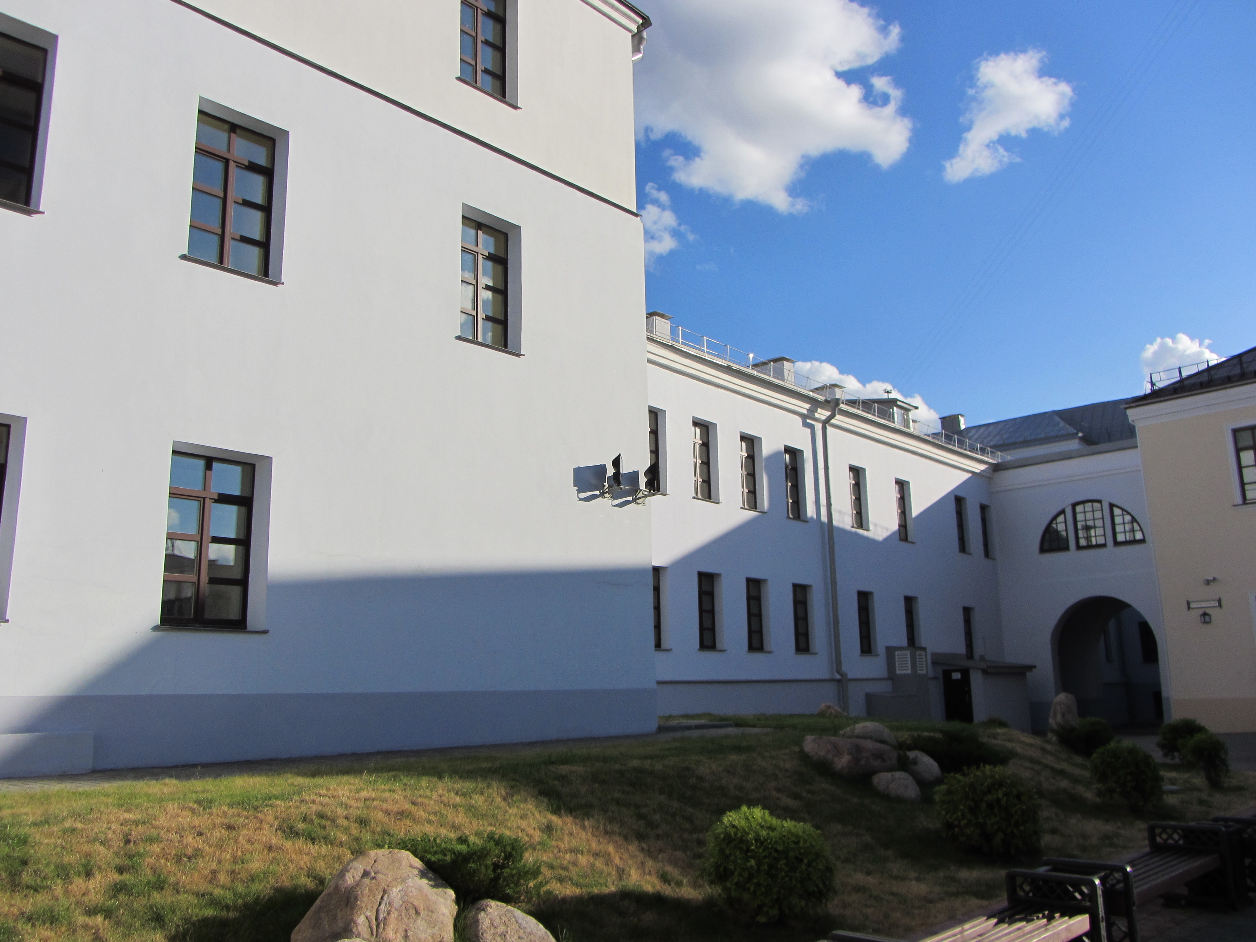 Беларуская (тарашкевіца): Вуліца Рэвалюцыйная, 2